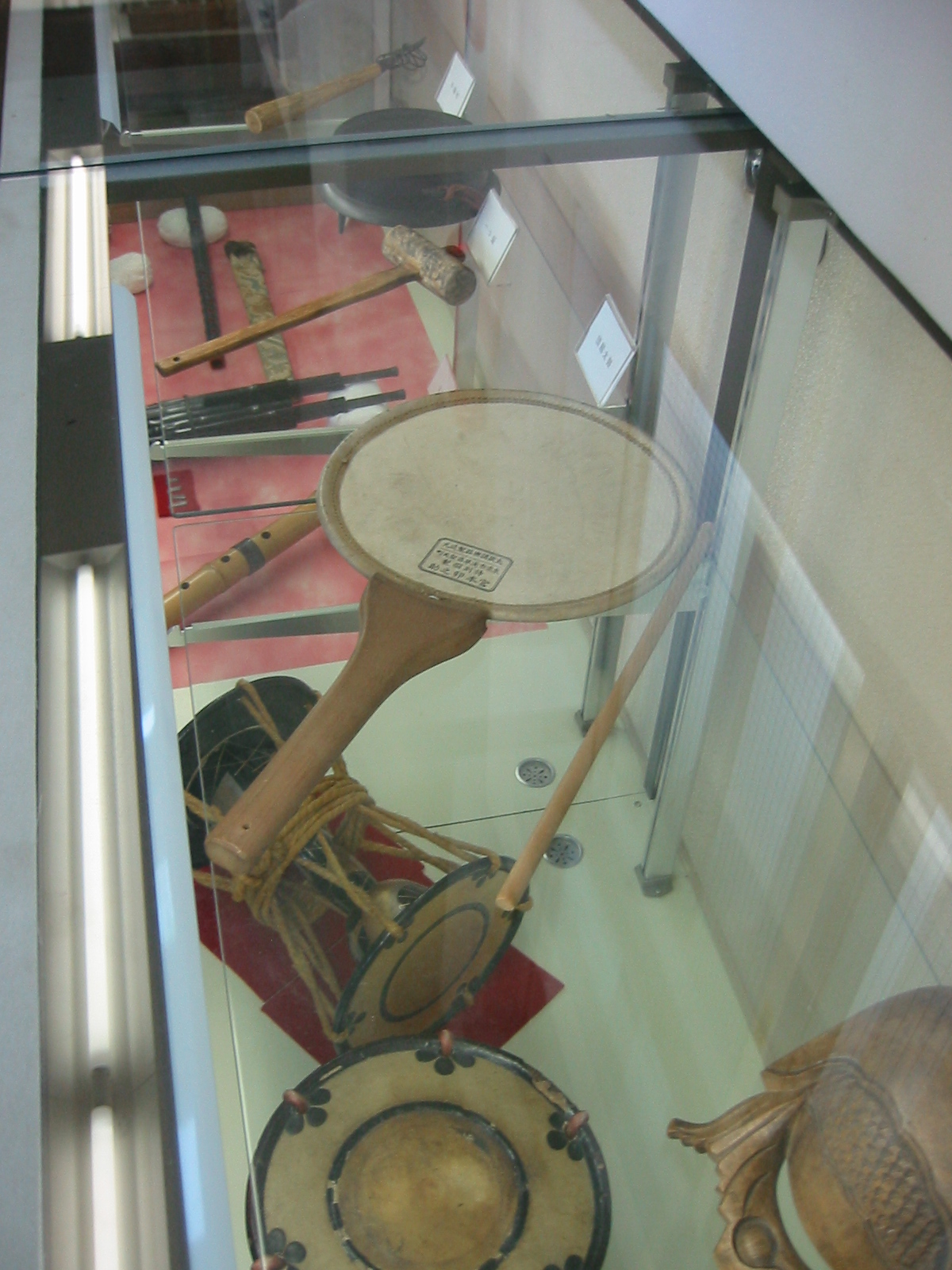 団扇太鼓岐阜城資料館にて